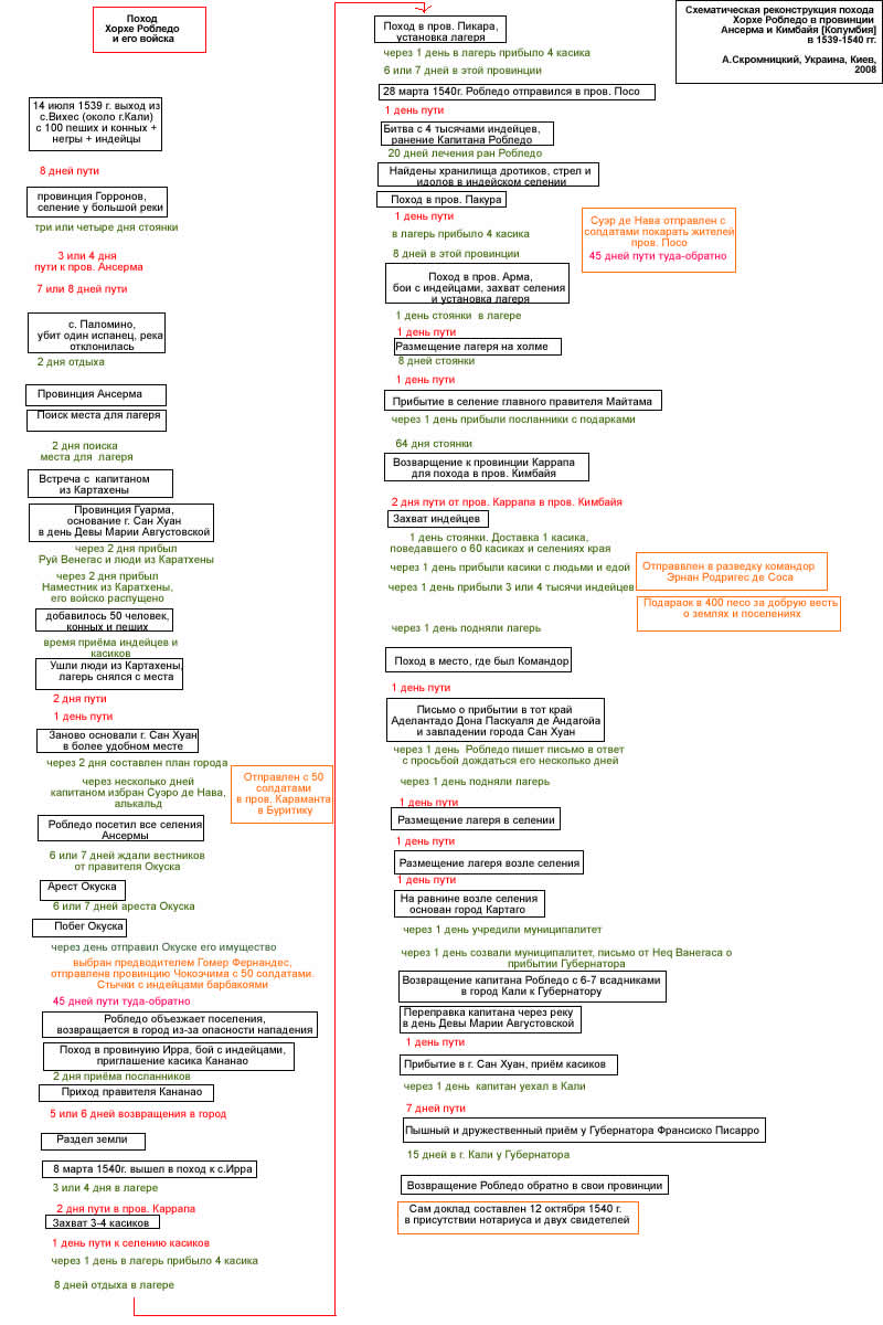 Esquema del viaje del capitan jorje robledo